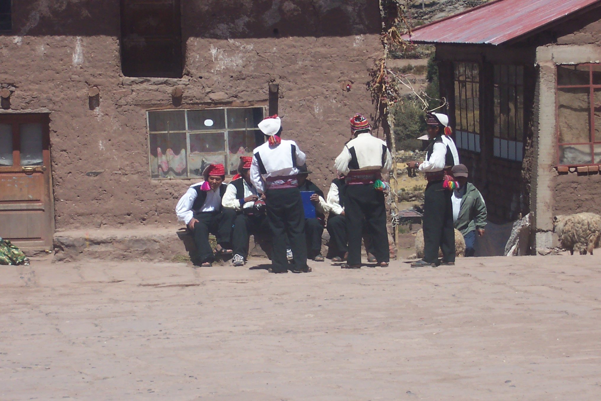 Taquile, Puno, Perú. Reunión de hombres en la plaza del pueblo Autor: Alfredobi Fecha: Agosto 2006